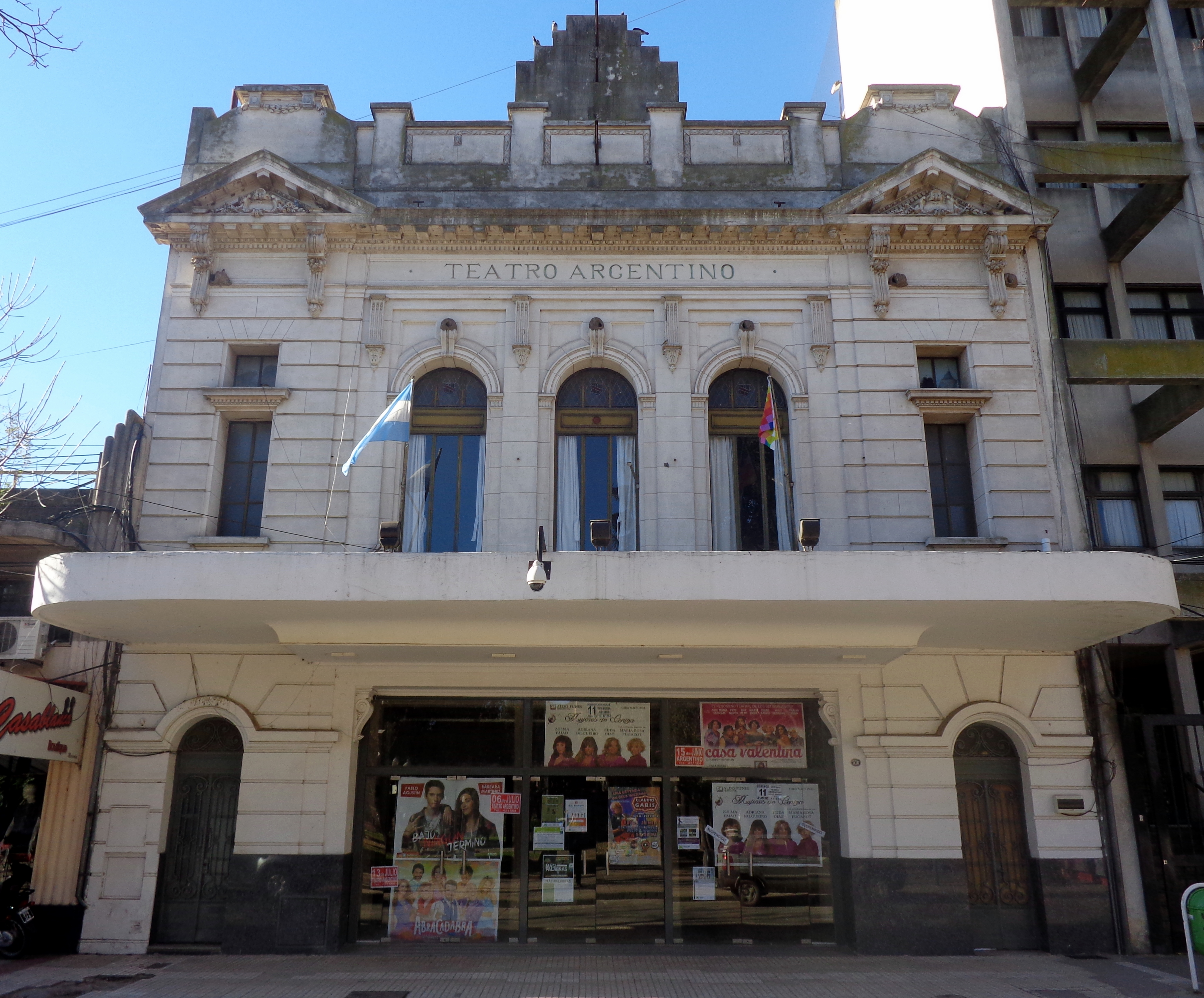 Centro cultural Julio César Gioscio, ex Teatro Argentino, Calle 27 entre 24 y 26, Mercedes, Provincia de Buenos Aires.